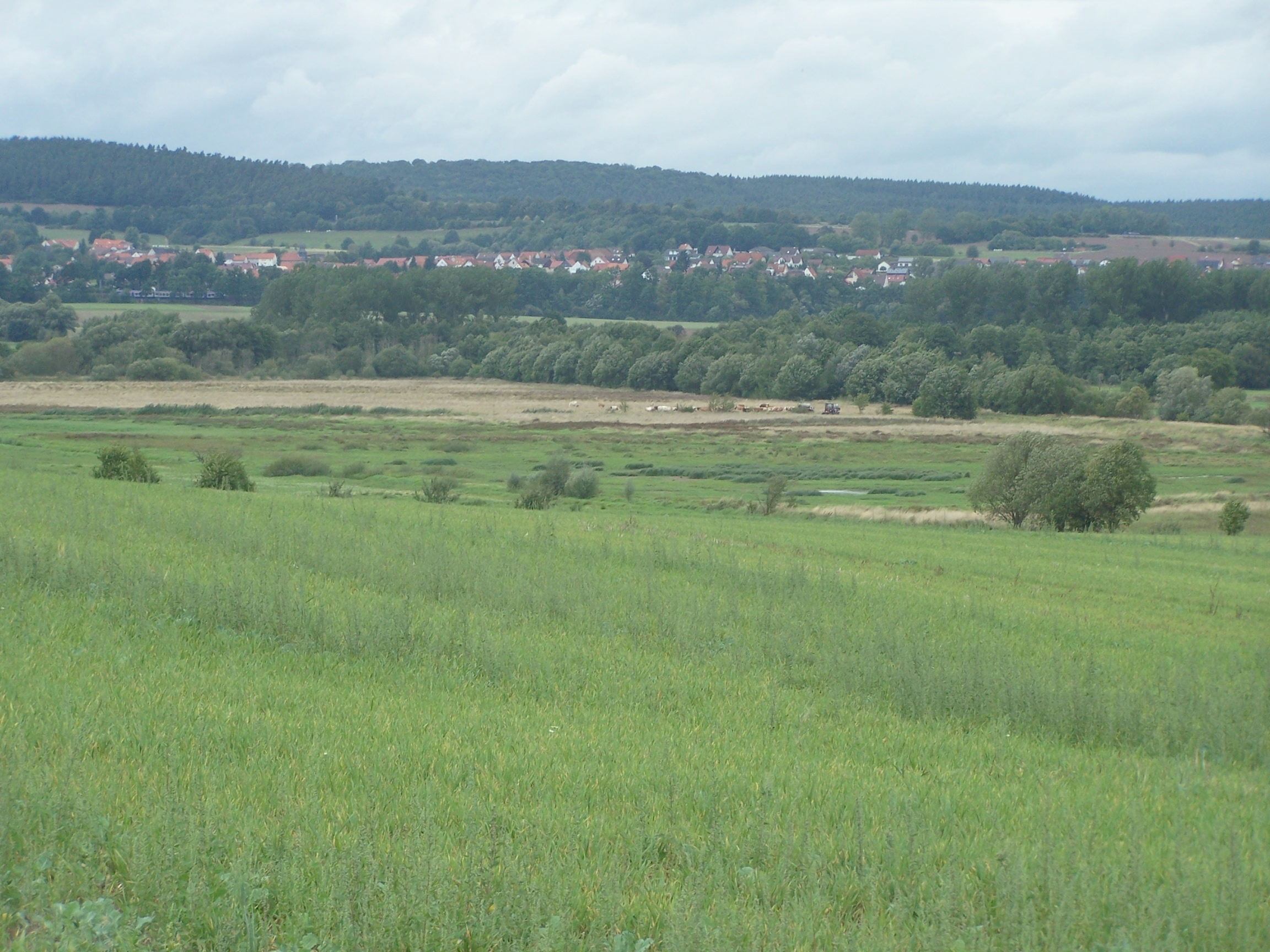 Blick von Süden auf Wildeck-Bosserode (Hessen), in der Bildmitte Teile der Naturschutzgebiete „Dankmarshäuser Rhäden“ (Vordergrund, Thüringen) und „Rhäden bei Obersuhl und Bosserode“ (Hessen).